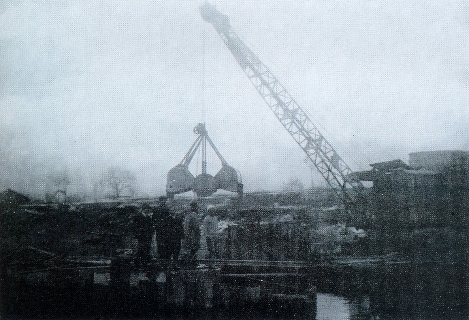 평원선 공사현장